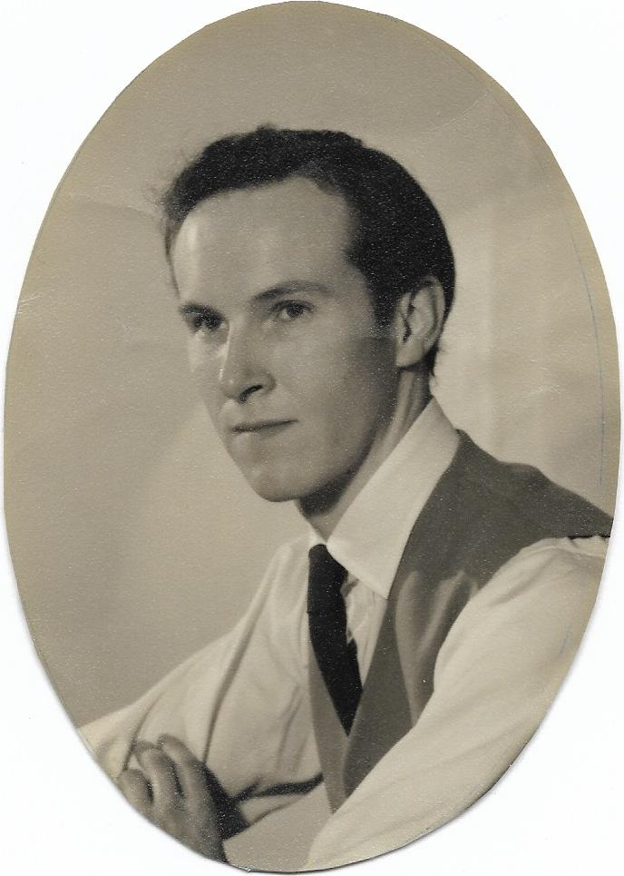 Fotografia di Lewis des Brisay, Londra 1953